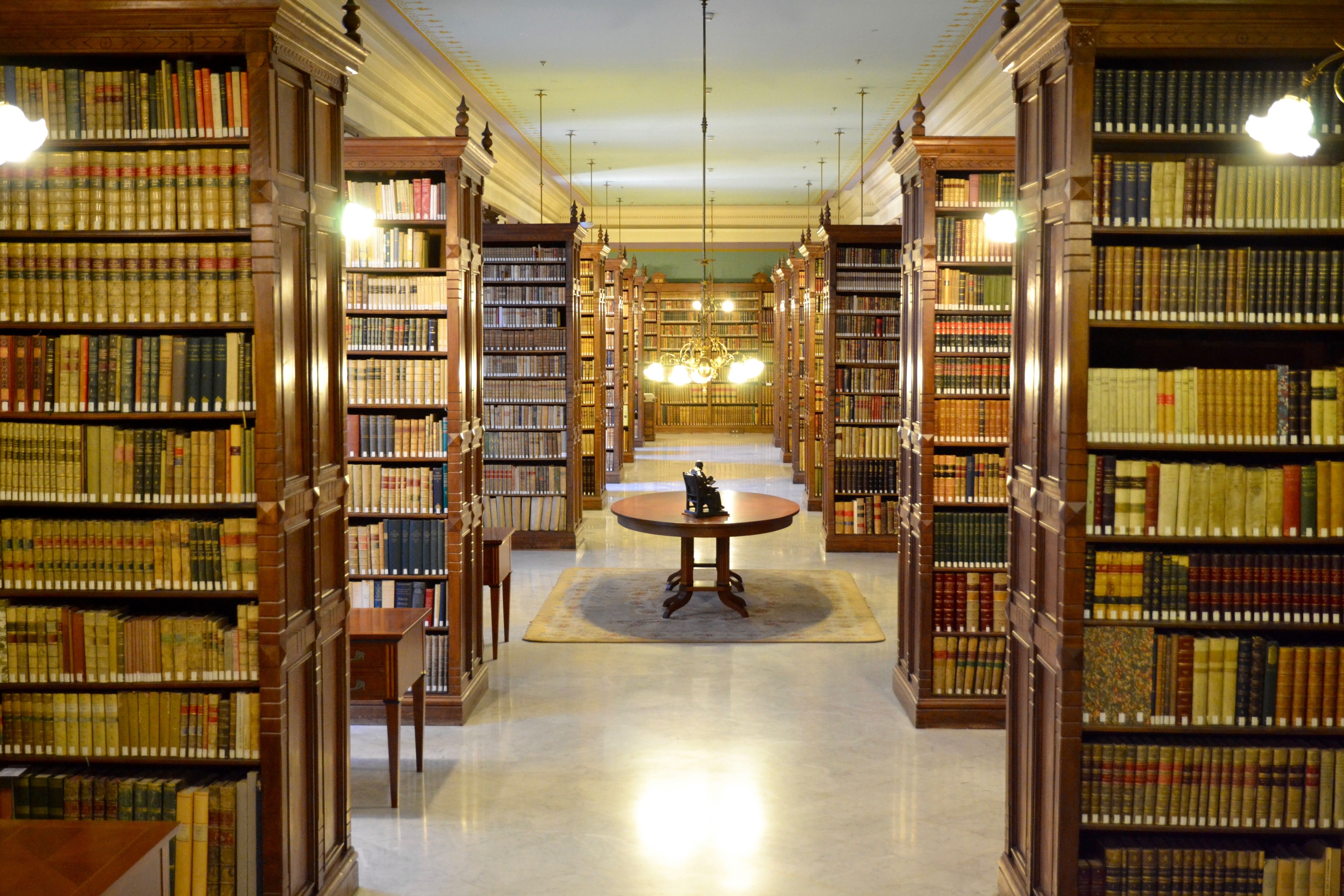 Biblioteca de la Real Academia Española.